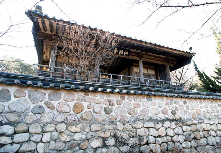 경상북도 유형문화재 제71호 강호정 (江湖亭)